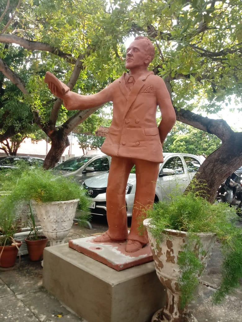 Vista da praça da Central de Artesanato Mestre Dezinho.